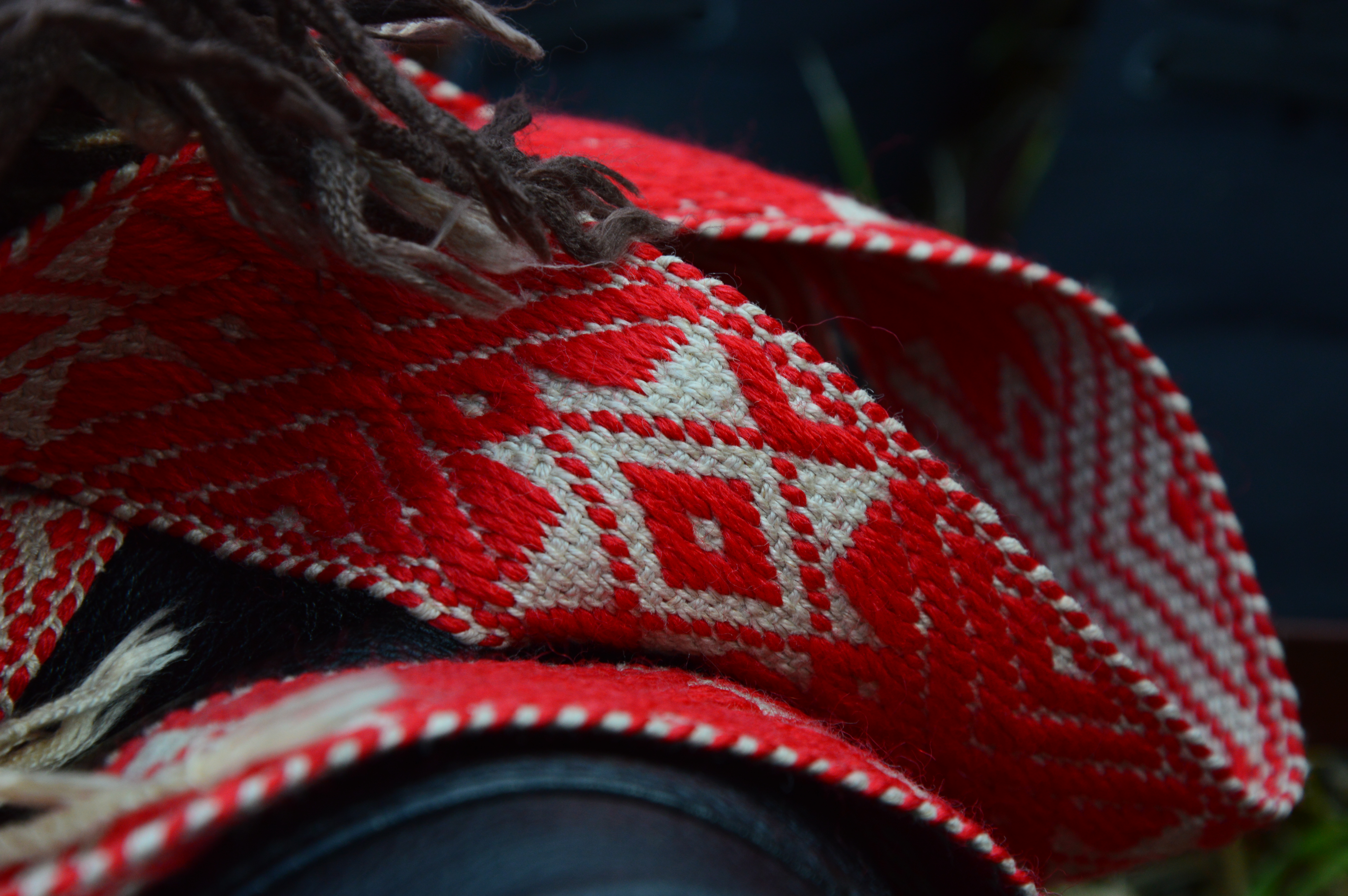 Eesti rahvariidevöö